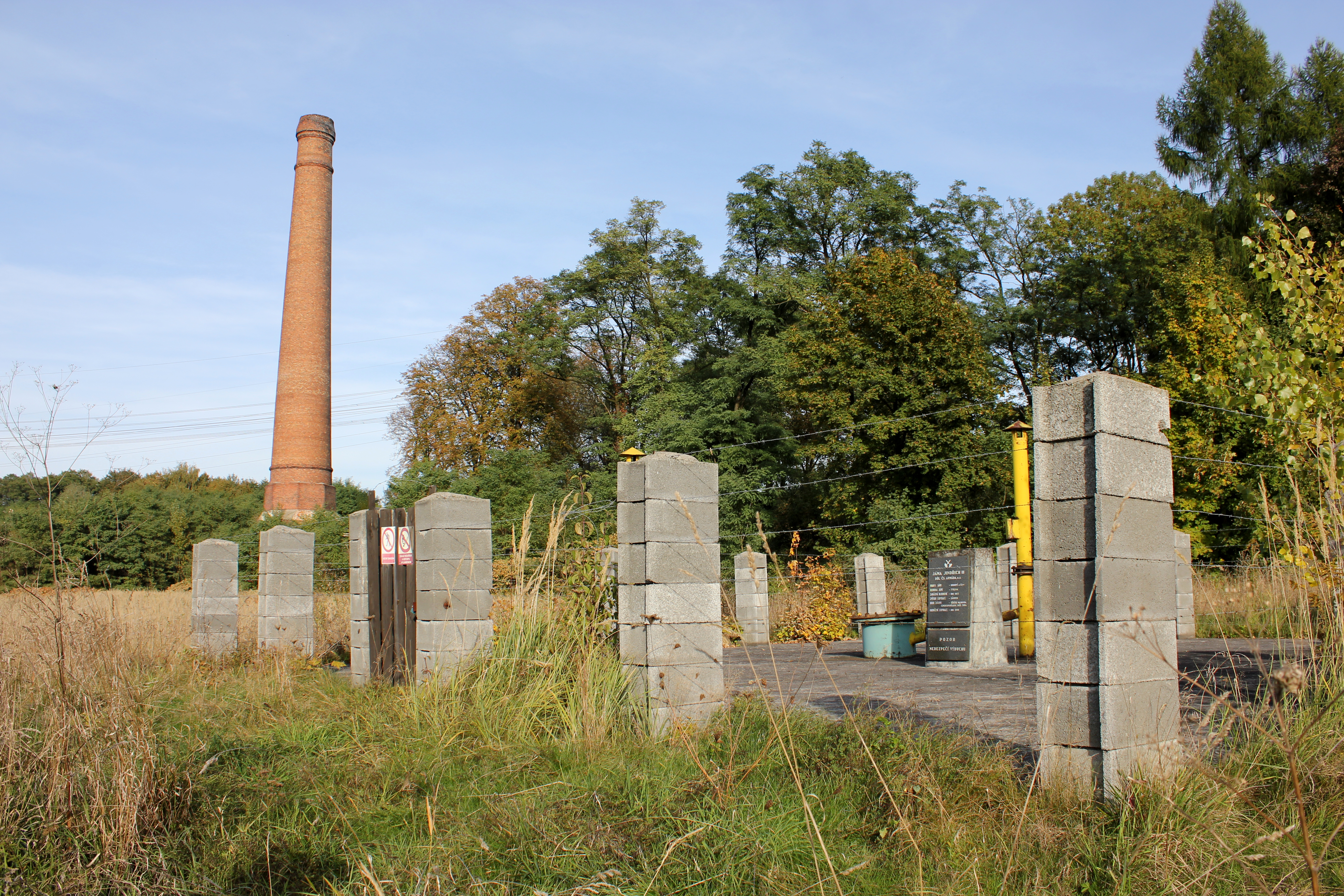 Jáma č. III, důl Jindřich, Karviná-Doly.